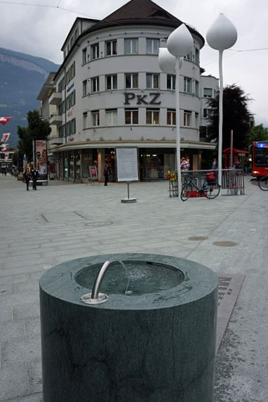 Der neu gestaltete Alexanderplatz mit Trinkbrunnen, Rauschen des Mühlbachs, ein Wasserspiel und die drei Lotusblüten von Not Vital